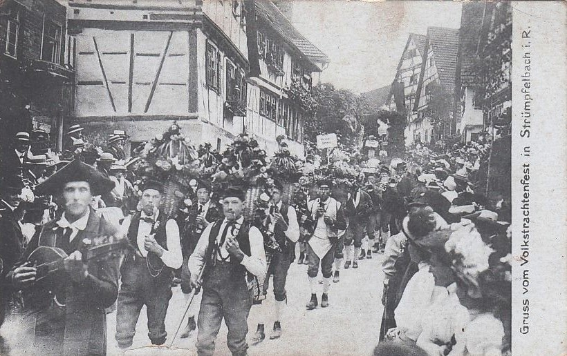 Volkstrachtenfest in Strümpfelbach bei Weinstadt.